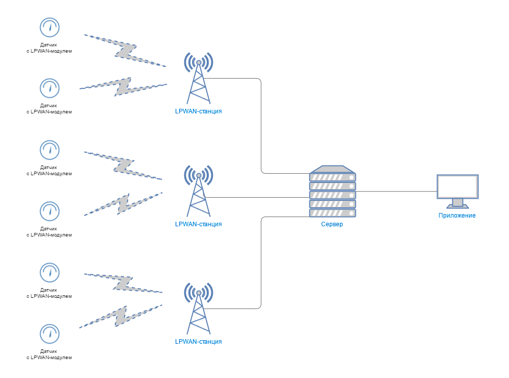 Сетевая топология LPWAN сети